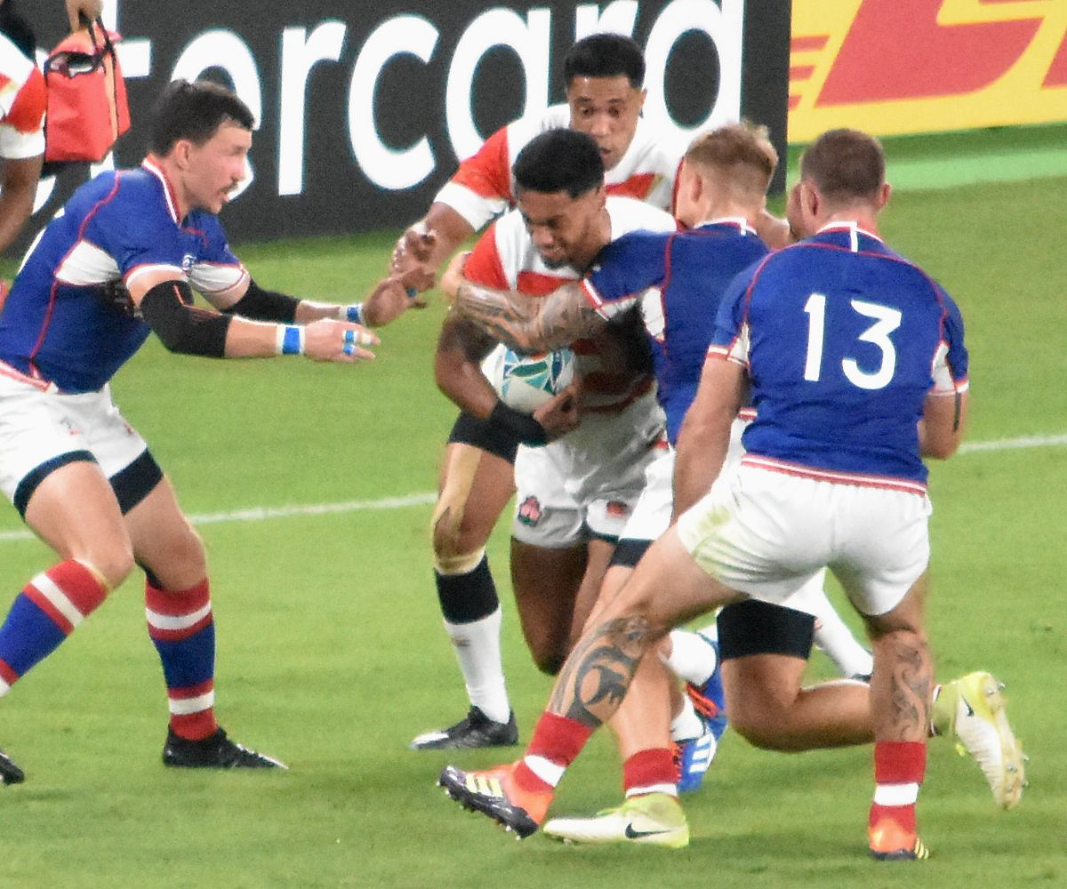 ラファエレティモシー